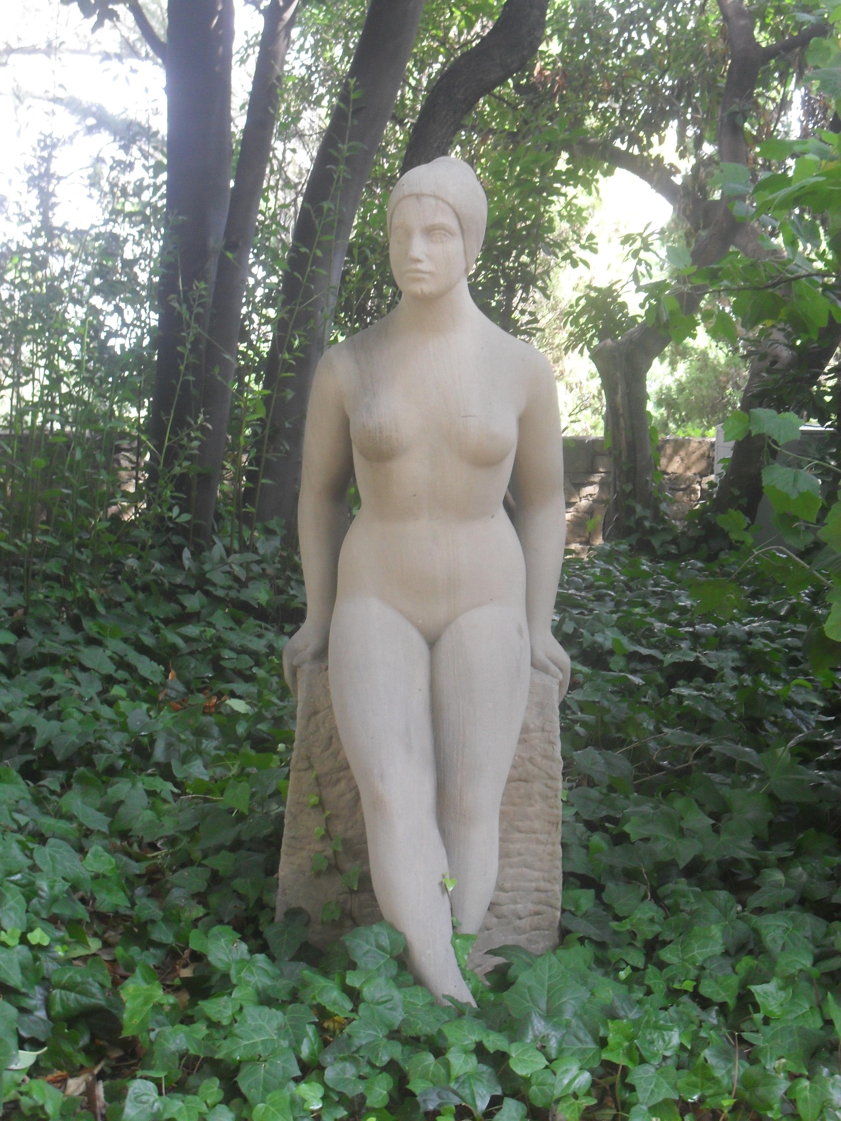 montjuic- barcelona